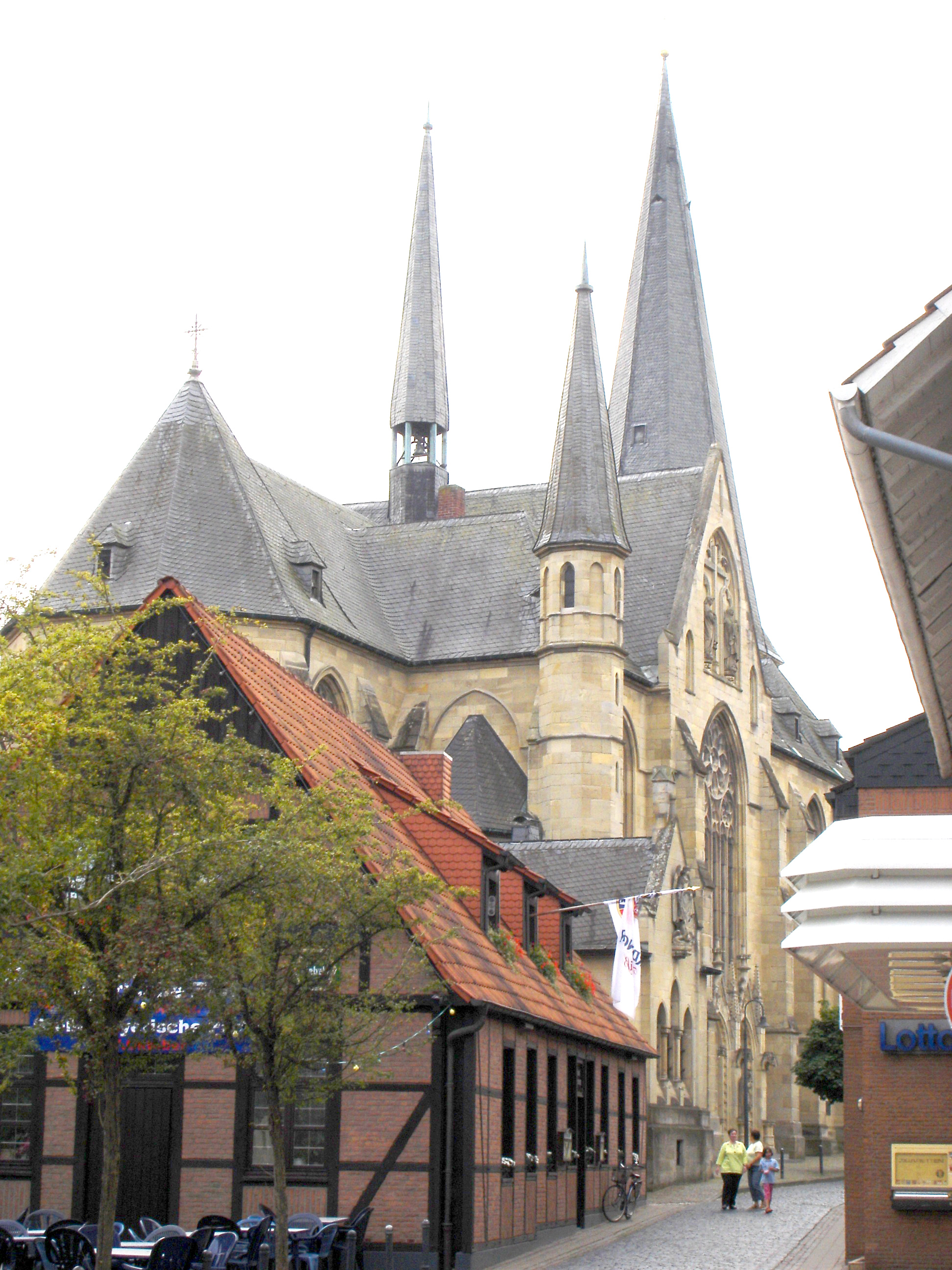 Zentrum von Roxel, Münster, Deutschland